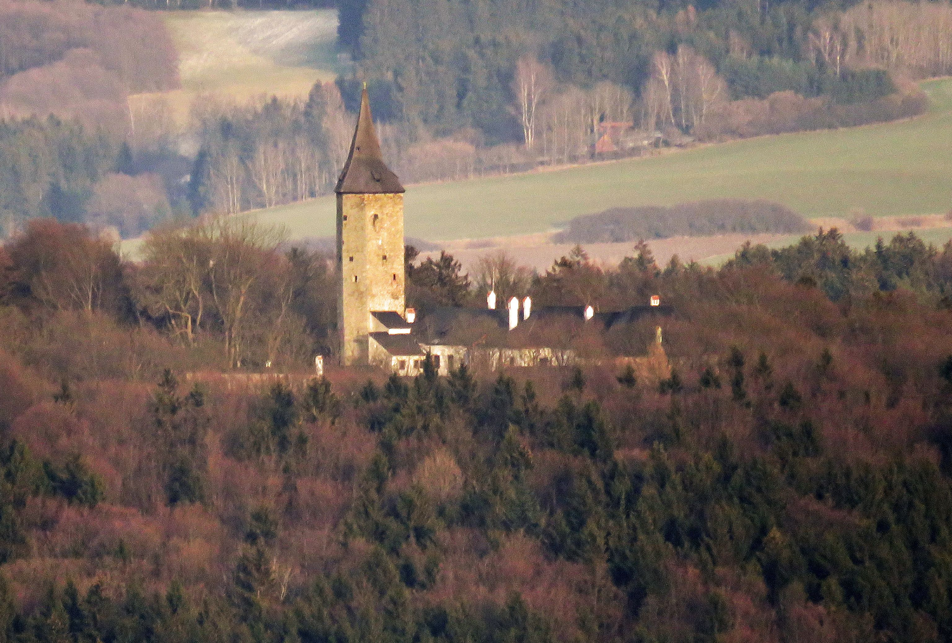 Hrad Roštejn – pohled z Javořice. Gotickou věž od vrcholu hory nicméně pořád dělí 7 kilometrů.